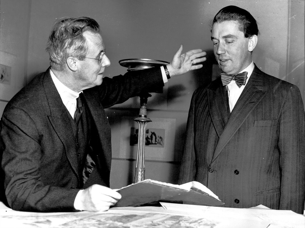 Europas finaste konstnärssöner har häpnat ... innan vi ens hunnit gäspa! Ja, man kan fråga sig om vederbörande här hemma ens idag förstår vad vi äger i Gustav III:s paviljong på Haga? Ett lysande klassiskt arv av europeisk betydelse, ja nära nog det enda vi har av sådan rang i vårt fattiga lilla land. I det sammanhanget finns ett namn, som i högsta grad förtjänar att upprepas om och om igen för att bli känt, Louis Masreliez. Det finns bara en man i detta land som talar med sådan "eld och klarhet" om Gustav III:s epok, Carl David Moselius, fil.dr. och intendent på – nej af – Haga. På fredag öppnas i Nationalmuseum en utställning ordnad av honom över Louis Masreliez. "En länge glömd gustavian". SvD har gjort ett förhandsbesök på utställningen under intendent Moselius' ciceronskap. På bilden talar han hänfört över en teckning av konstnären inför sin medhjälpare, fil.lic. Runar Strandberg.